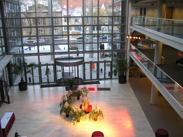 SZTE TIK bejárat